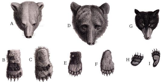 Titre : Illustrations de La Ménagerie du Muséum National d'Histoire Naturelle / Maréchal, Huet, Wailly, dess. Publication Paris : chez Miger, 1808 Description 41 est. : noir et blanc LicenceGPL et GFDL Notes Dans"La Ménagerie du Muséum National d'Histoire Naturelle"/ G. Cuvier et Lacépède, aut.du texte, Paris, chez Miger, 1808. L'ouvrage comprend 41 estampes, Muséum National d'Histoire Naturelle (Bibliothèque) Acq. : Museum National d'Histoire Naturelle Thème Sciences de la nature Genre audiovisuel Dessin d'animauxDessin Autre(s) auteur(s): Maréchal, Nicolas (17..-1803) Huet, Jean-Baptiste (1745-1811) Wailly (17..-....) Miger, Simon-Charles (1736-1820) Lacépède, Bernard-Germain-Etienne de (1756-1825) Cuvier, Georges (1769-1832) Sujet(s) Mammifères Zoologie -- 19e siècle -- France -- Paris (France) Jardin des Plantes (Paris) Détail du contenu : No d'image 36 Titre pl.36 : Parties caractéristiques de l'ours blanc, de l'ours brun et de l'ours noir / peint par Maréchal, gravé par Miger. [cote : d11301] nettoyer et modifié avec Gimp par Rinaldum 8 jan 2004 à 21:04 (CET)